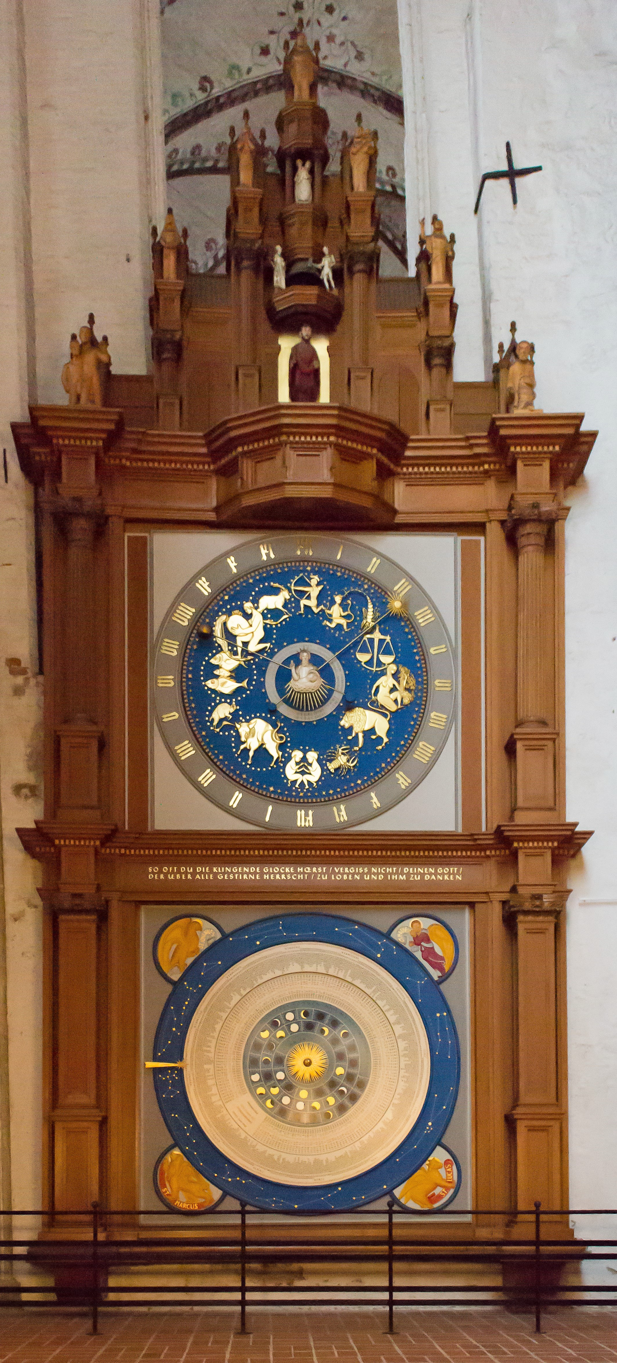 Marienkirche Lübeck - Astronomische Uhr